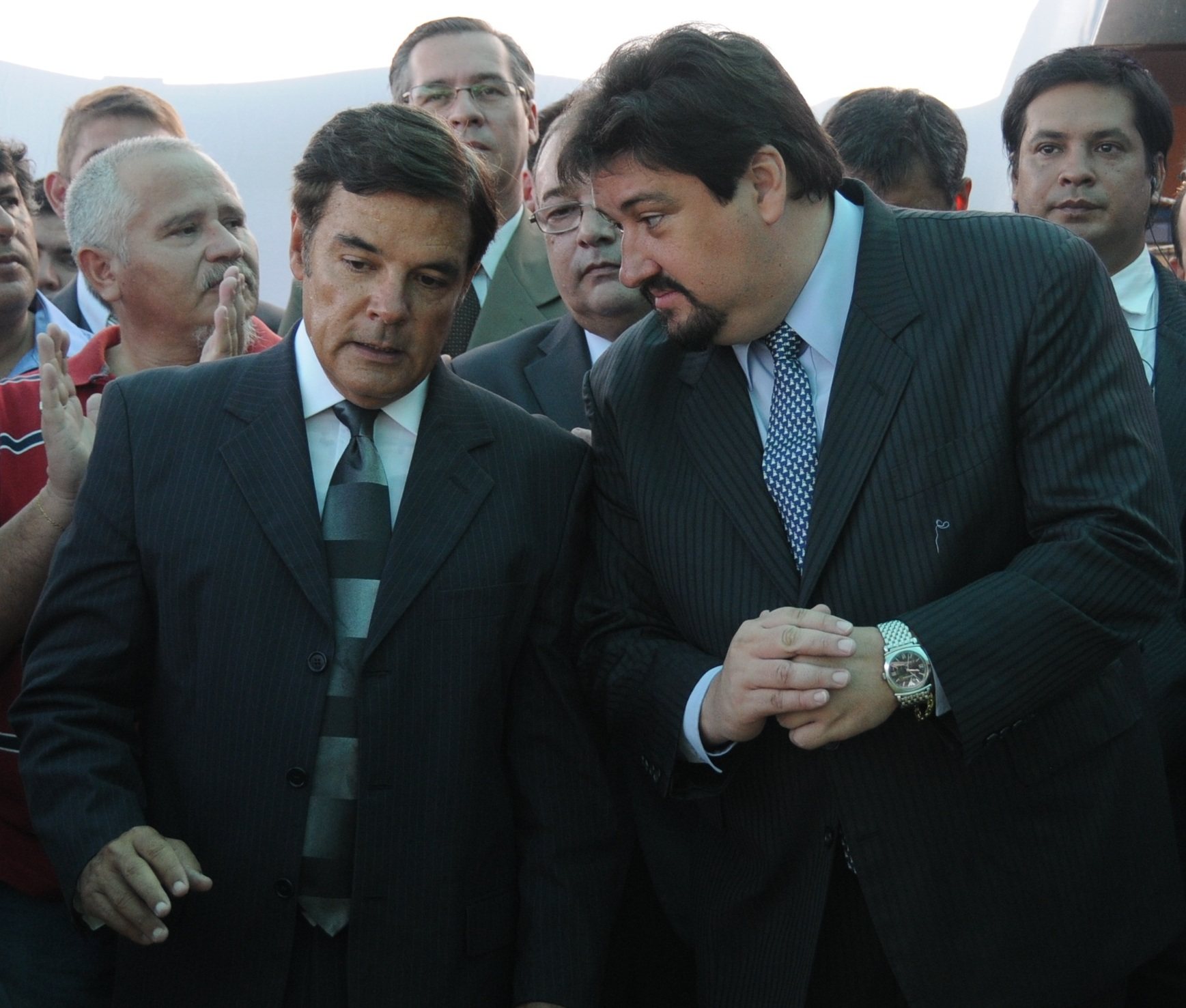 Rovira y su sucesor,el gobernador Maurice Closs